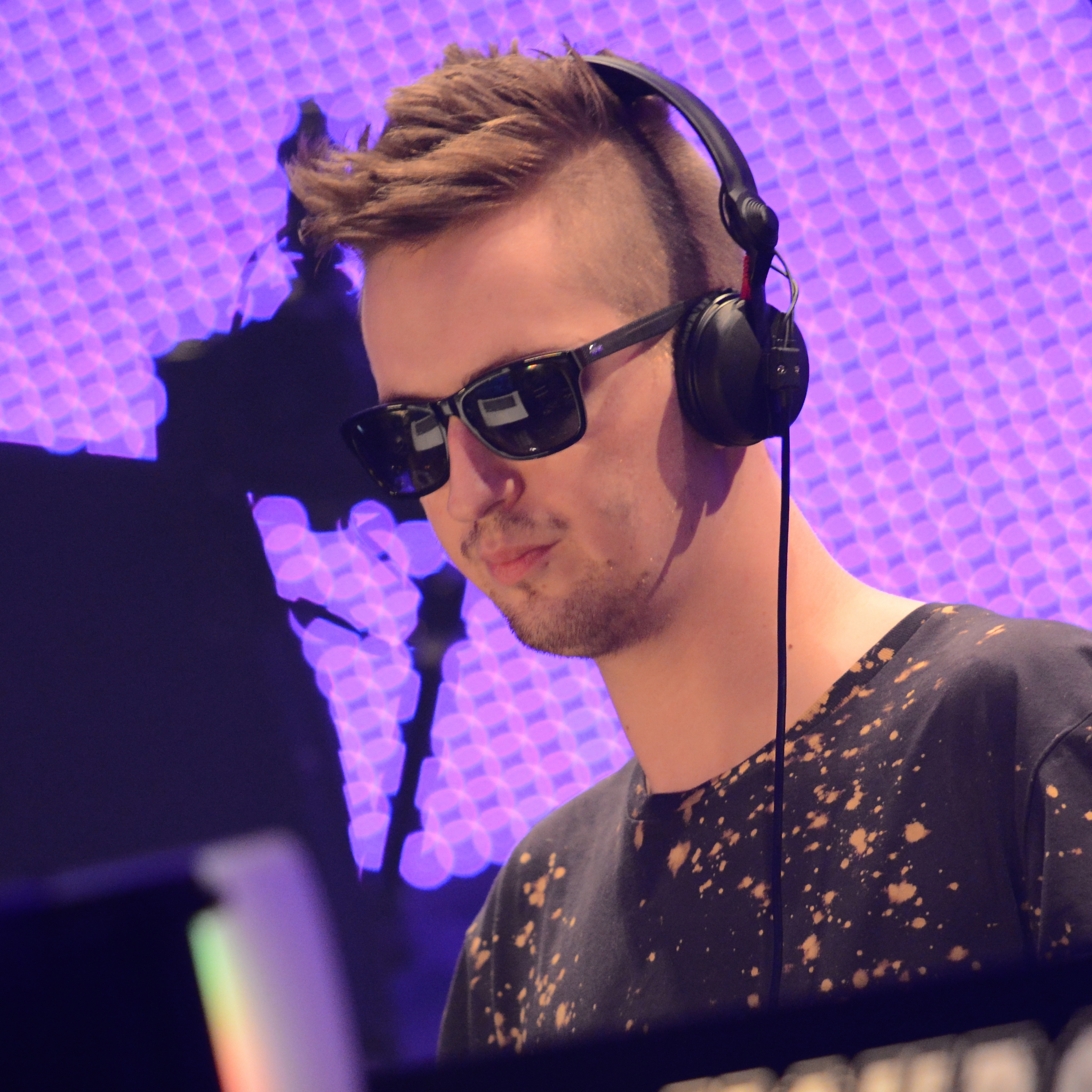 Robin Schulz bei Mayday 2014.